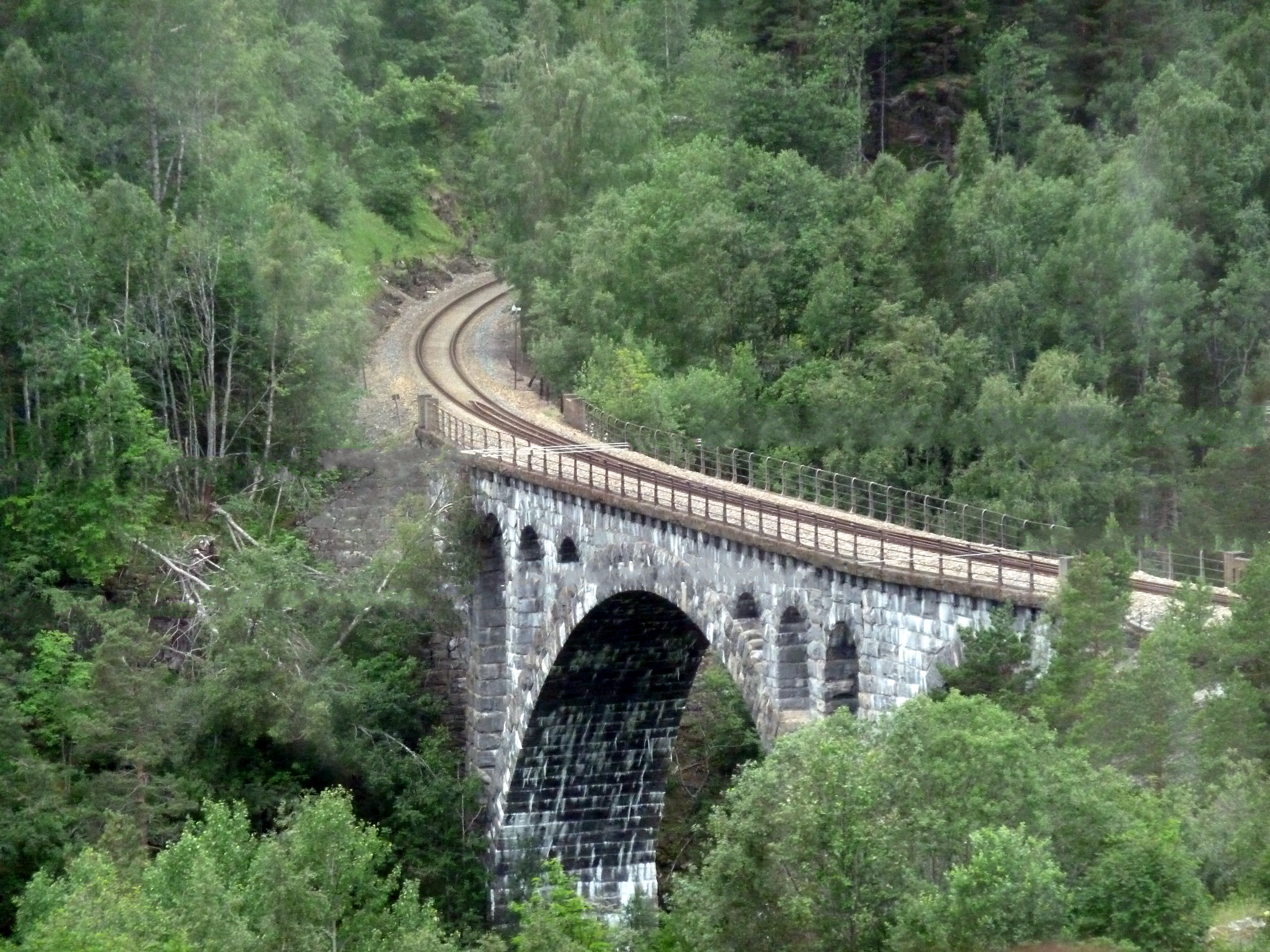 2010-07-30 - Kylling-Brücke über die Rauma